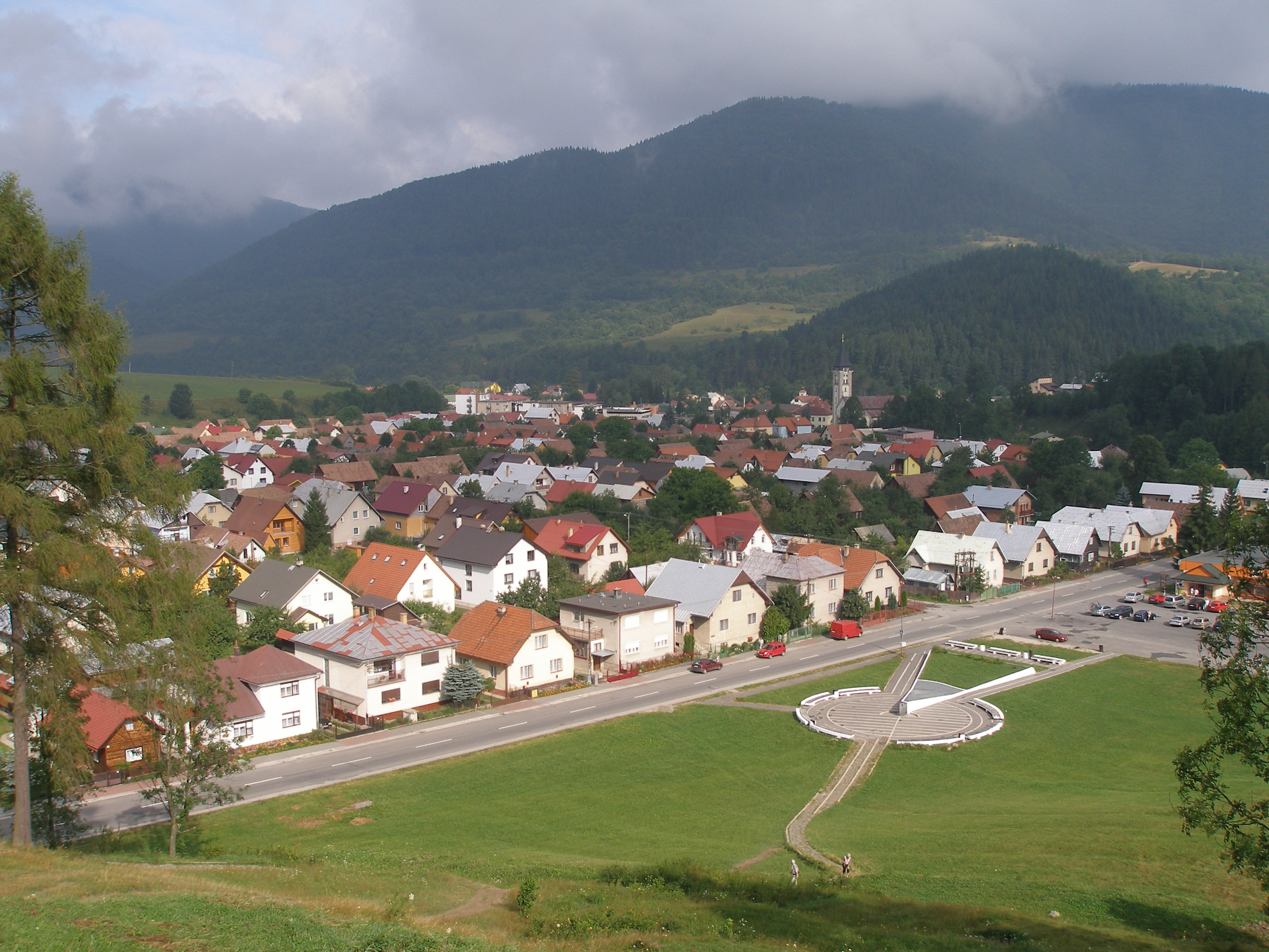 Rázovitá slovenská obec Terchová,rodisko ľudového slovenského hrdinu Juraja Jánošíka.